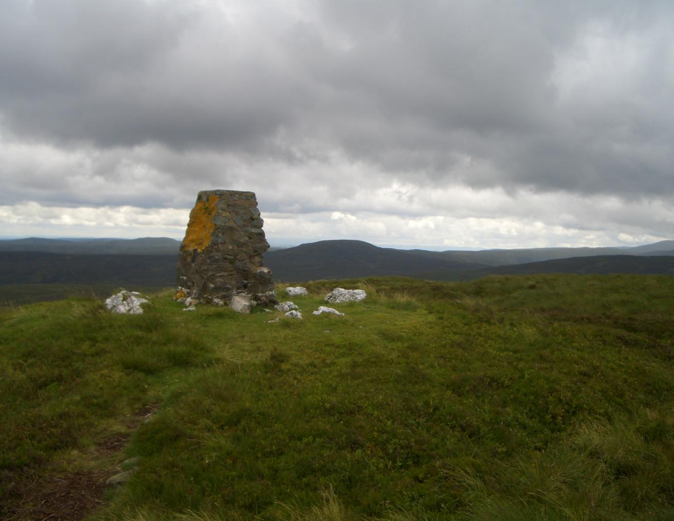 moel cerrig duon